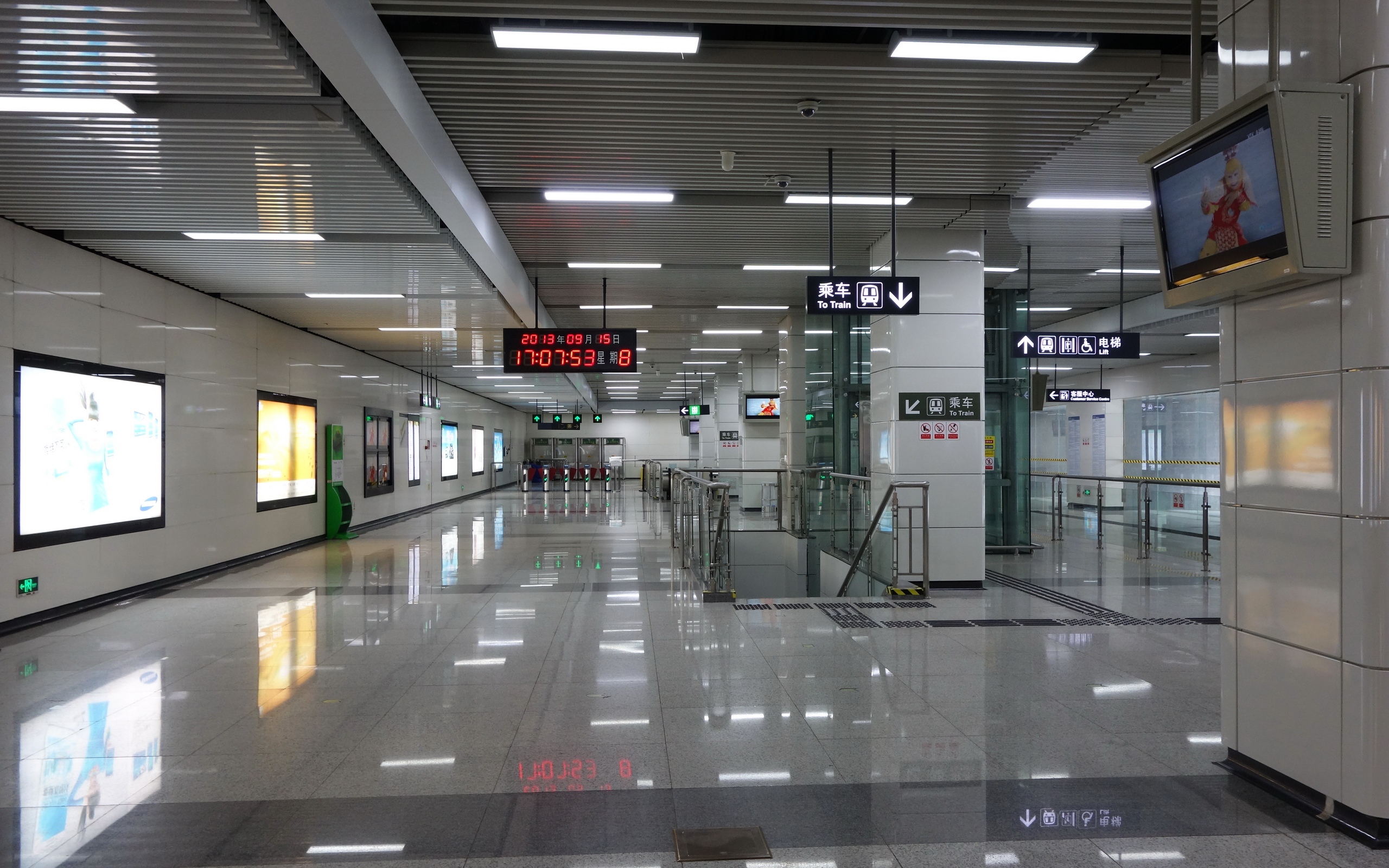 蛇口線红树湾车站站厅